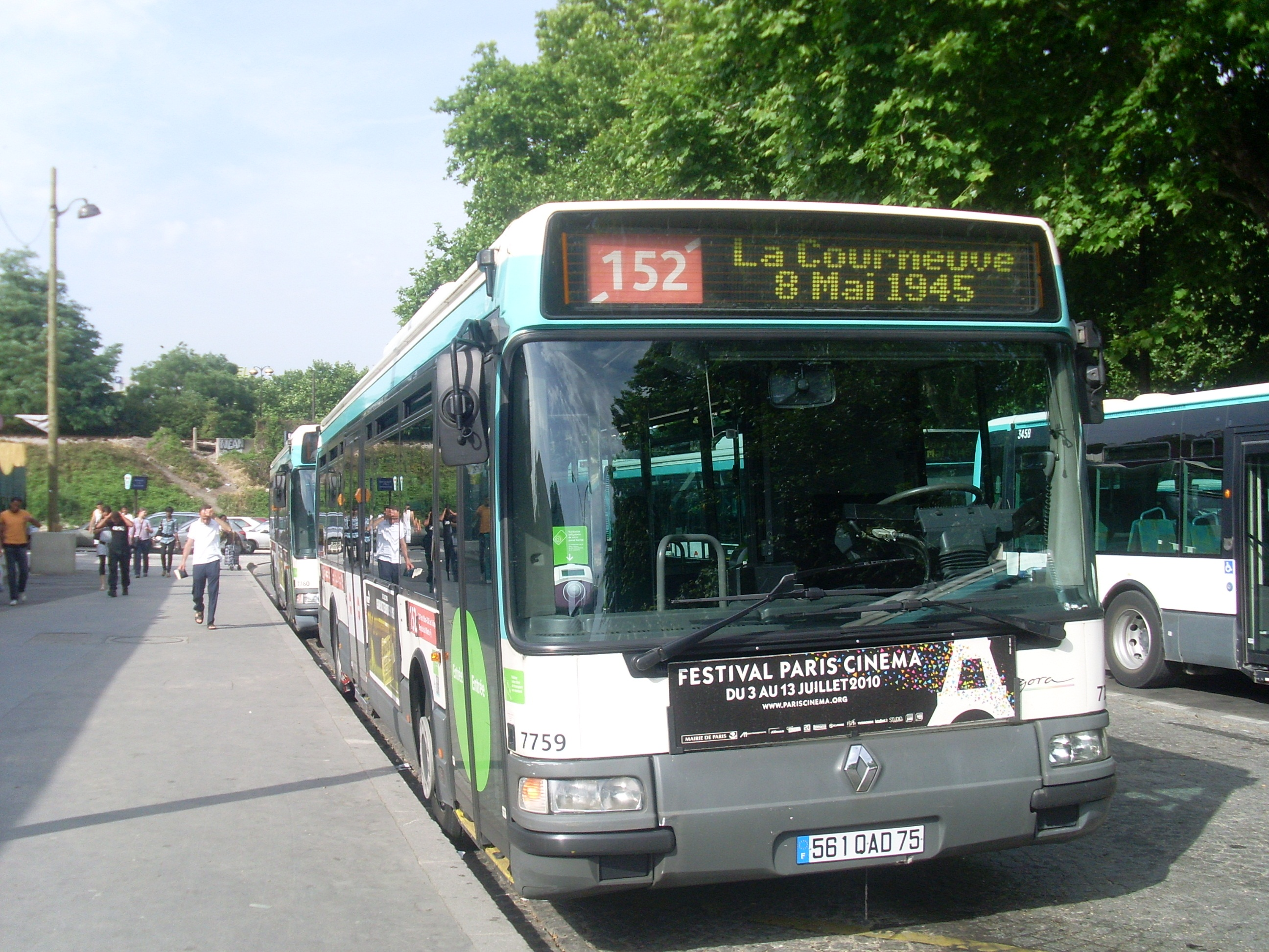 Bus 152 au terminus Porte de la Villette